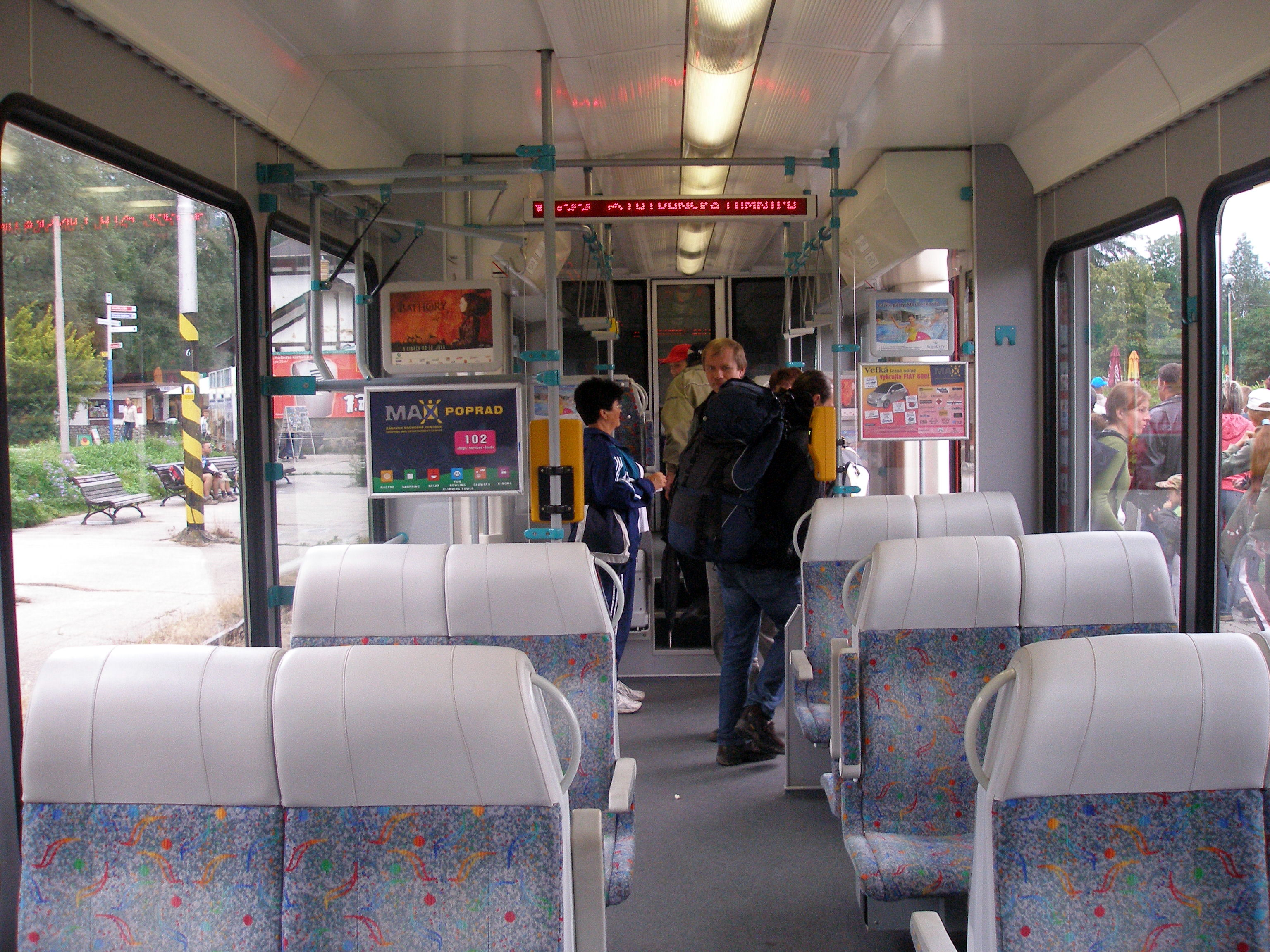 Osada Tatranská Lomnica